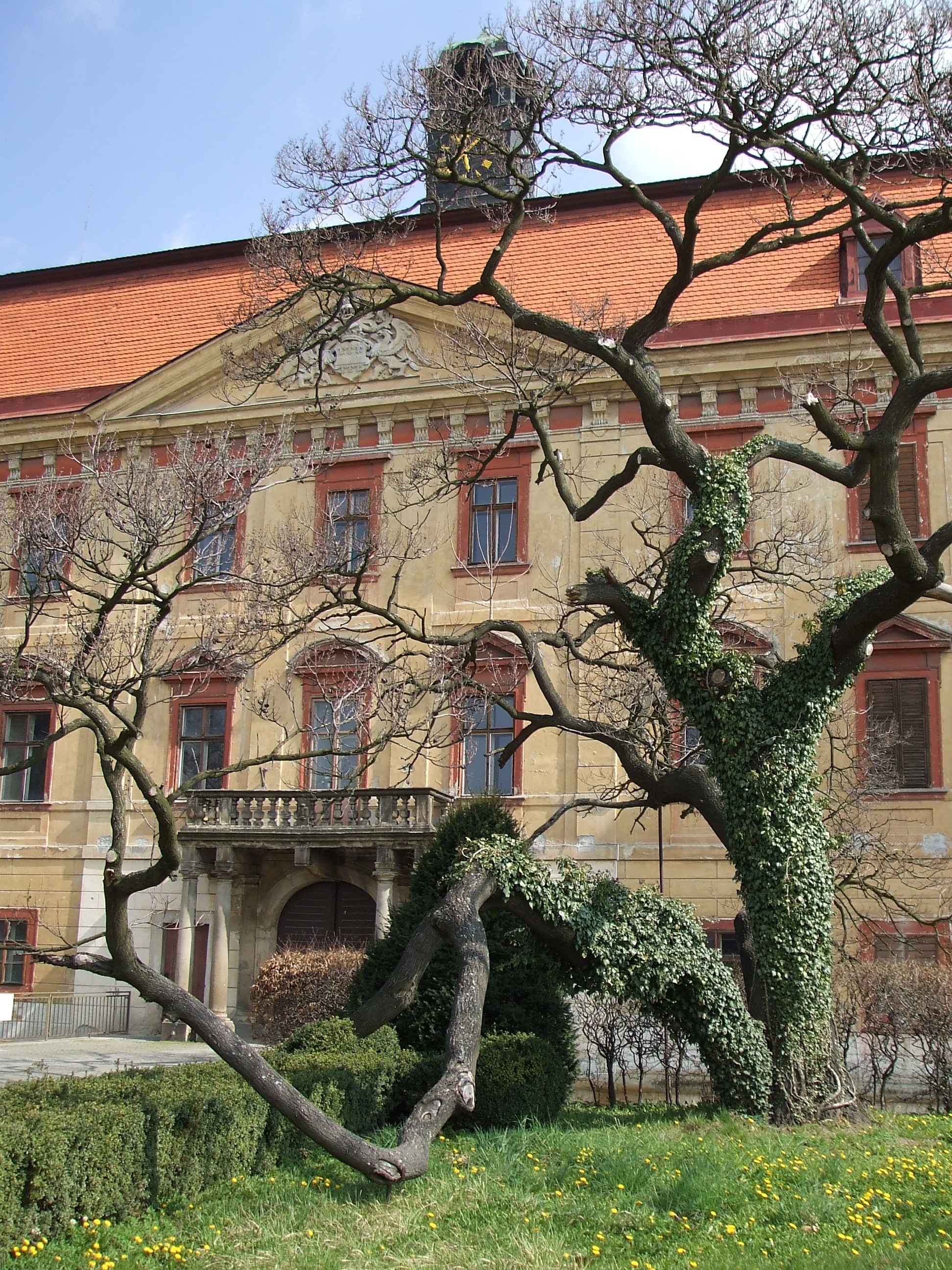 Zámek Holešov, nám. F. X. Richtra 190, Holešov